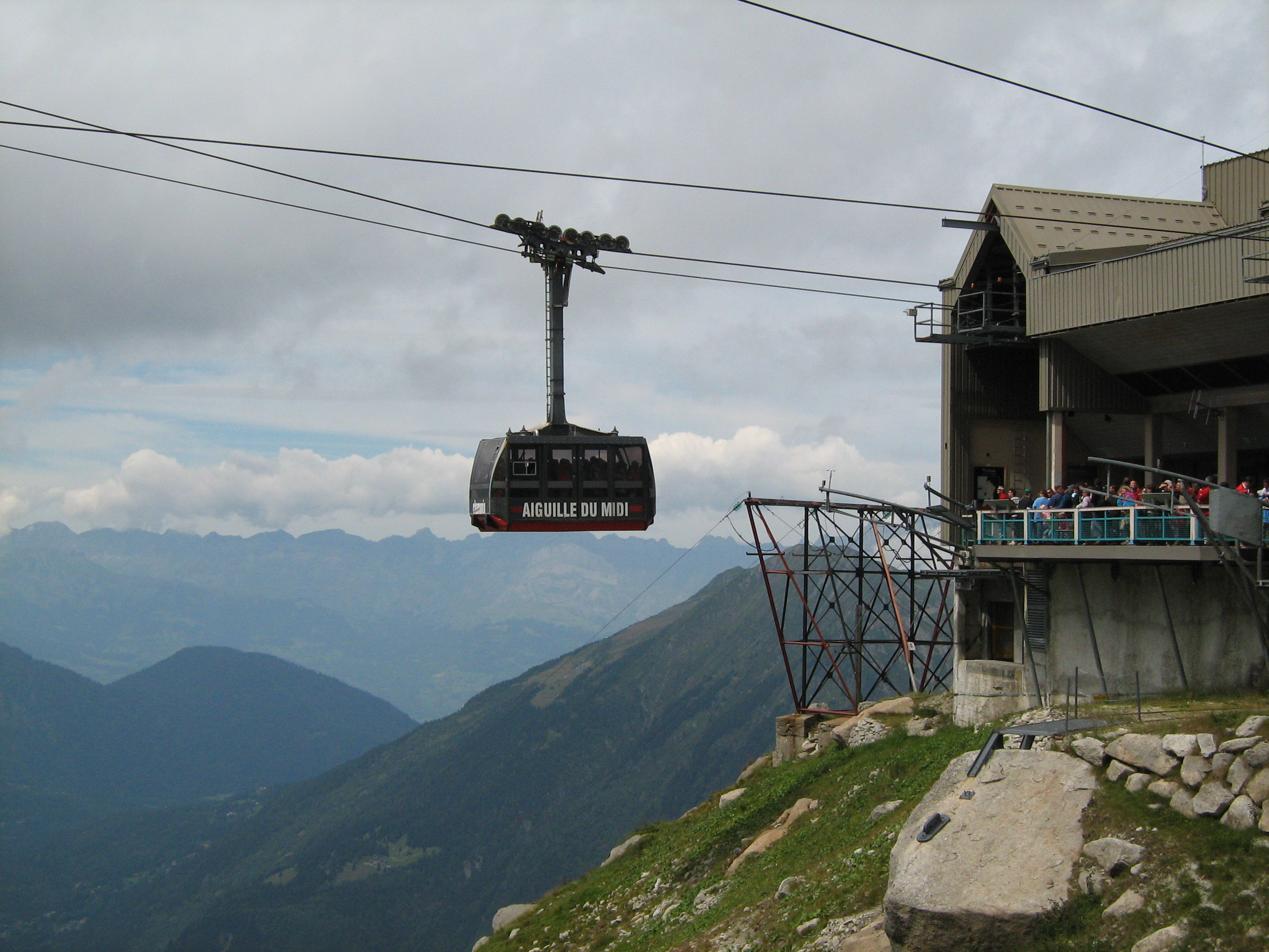 Aiguille du Midi-svævebanekabine ved midterstationen, august 2007